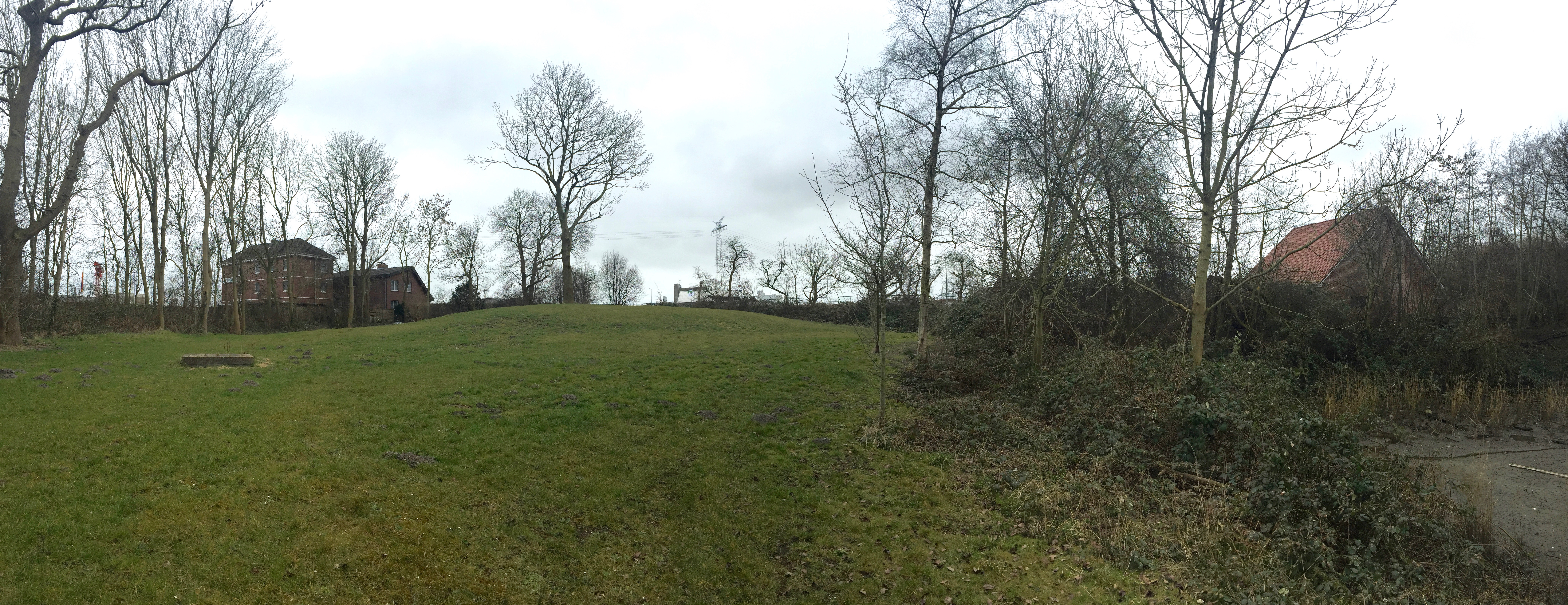 Die Kirchwarft von Nesserland im Jahre 2016.